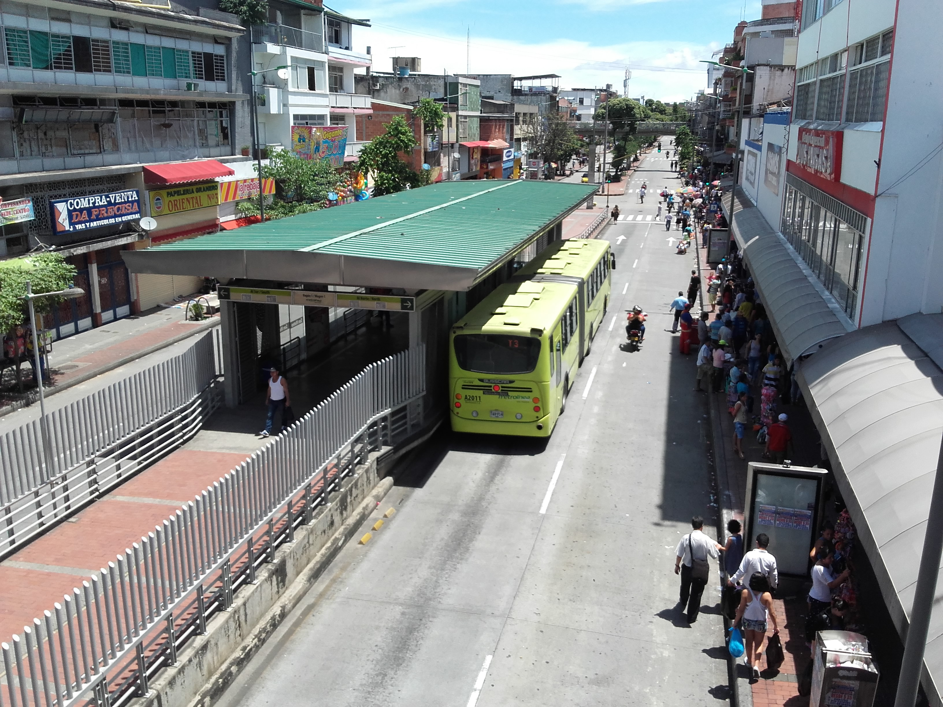 Estación con bus en Bucaramanga